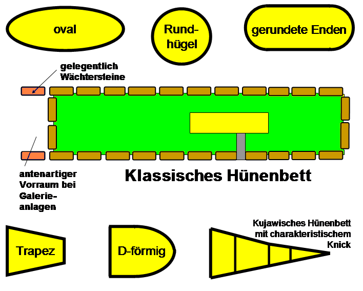 Einfassungen